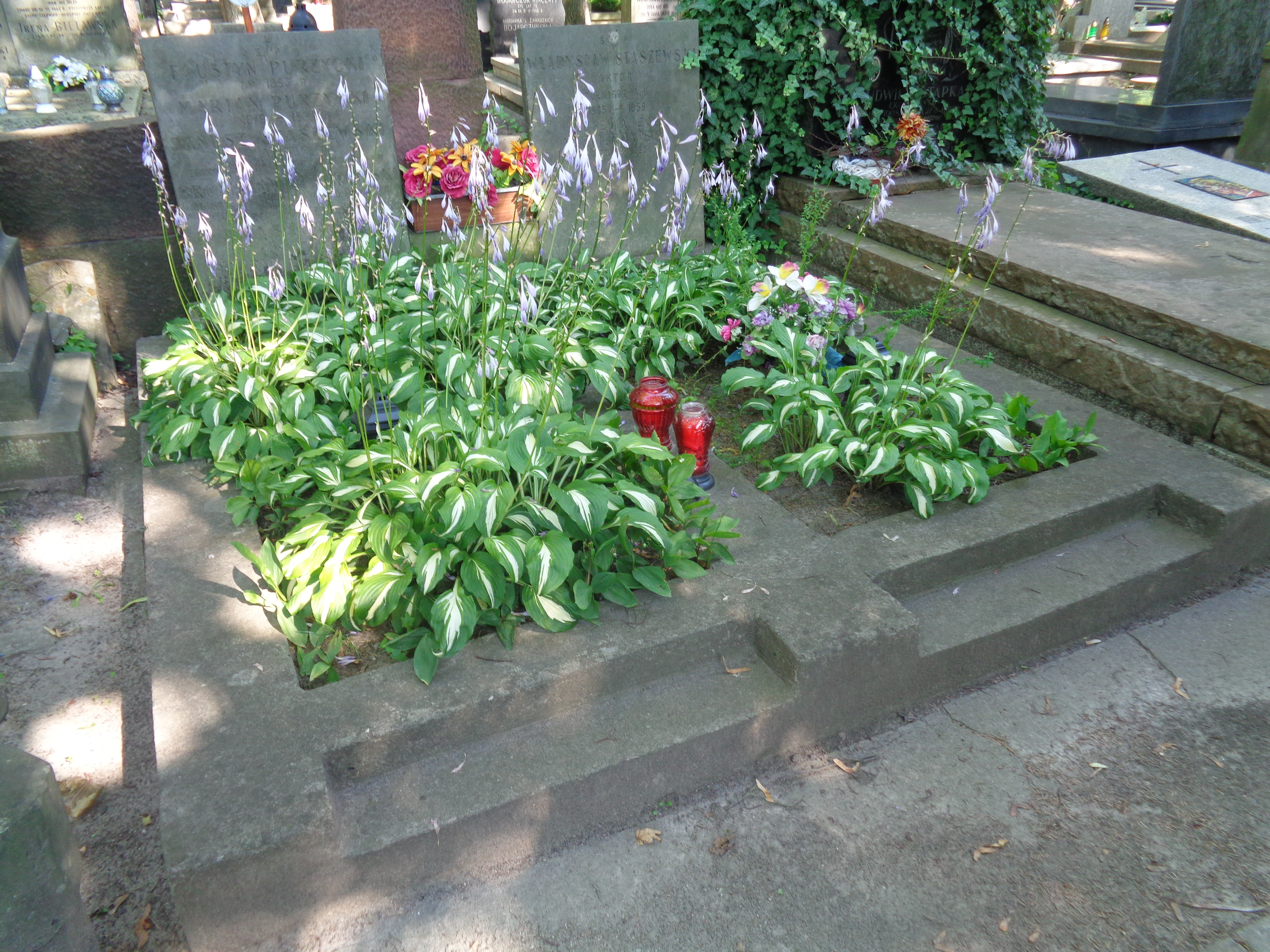 Grób Władysława Staszewskiego na Cmentarzu Powązkowskim